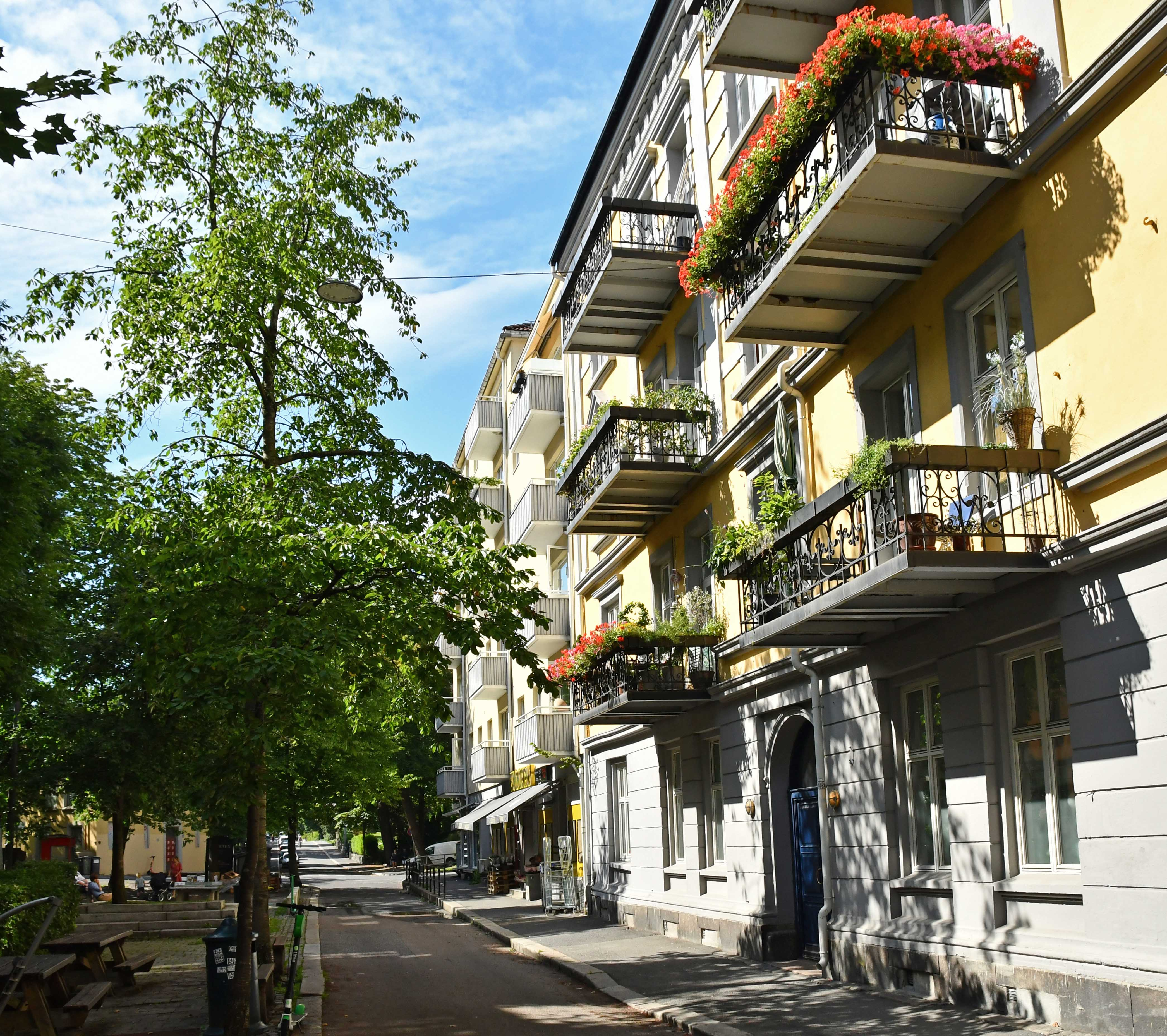 Lassons gate 3 med balkonger utvidet 1993